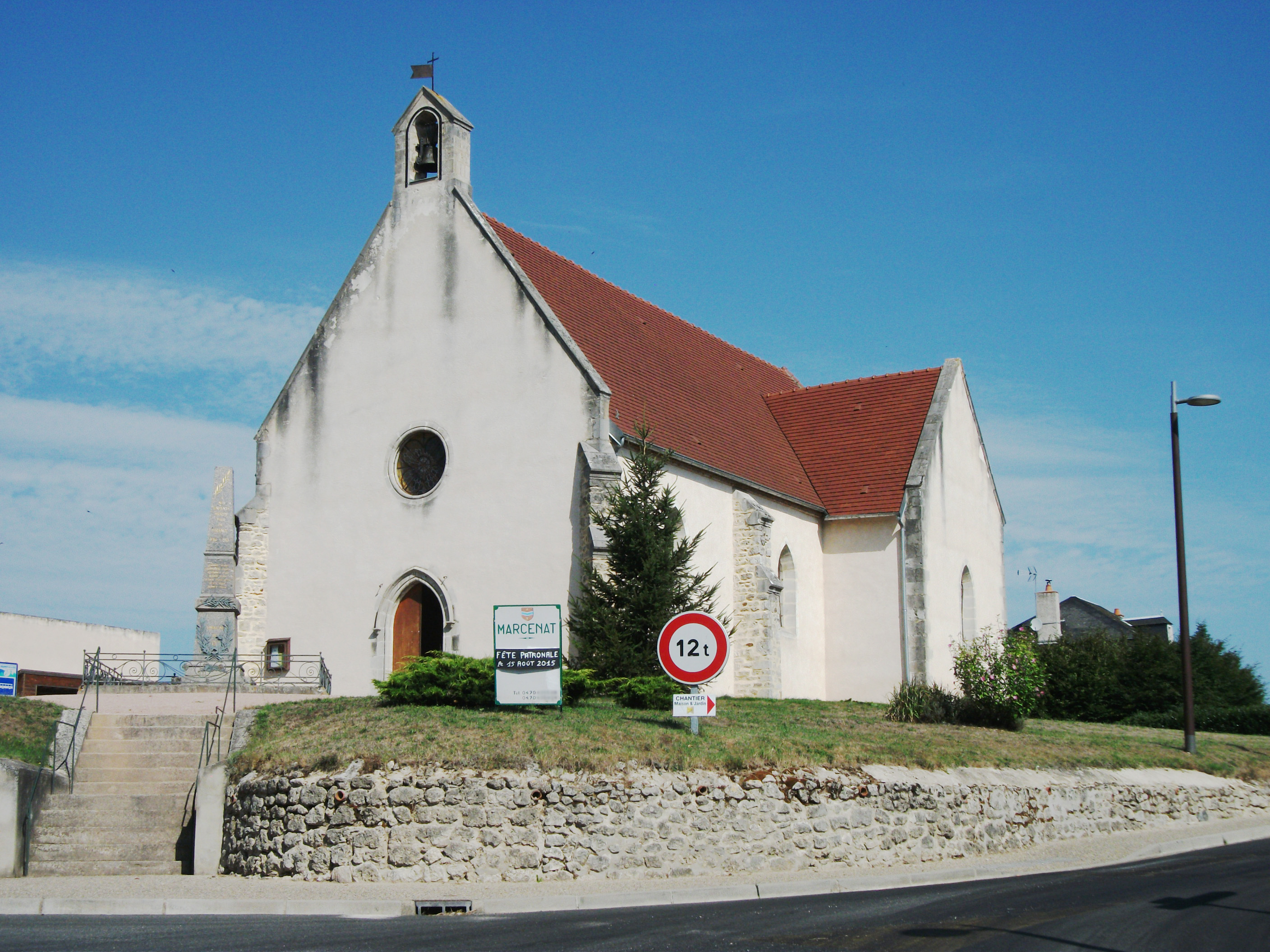 Edifice (church?) in Marcenat [8598] / Édifice (église?) de Marcenat [8598]